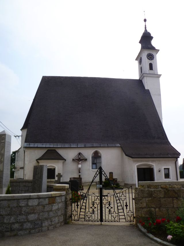 Pfarrkirche hl. Ägidius und Friedhof, Antiesenhofen